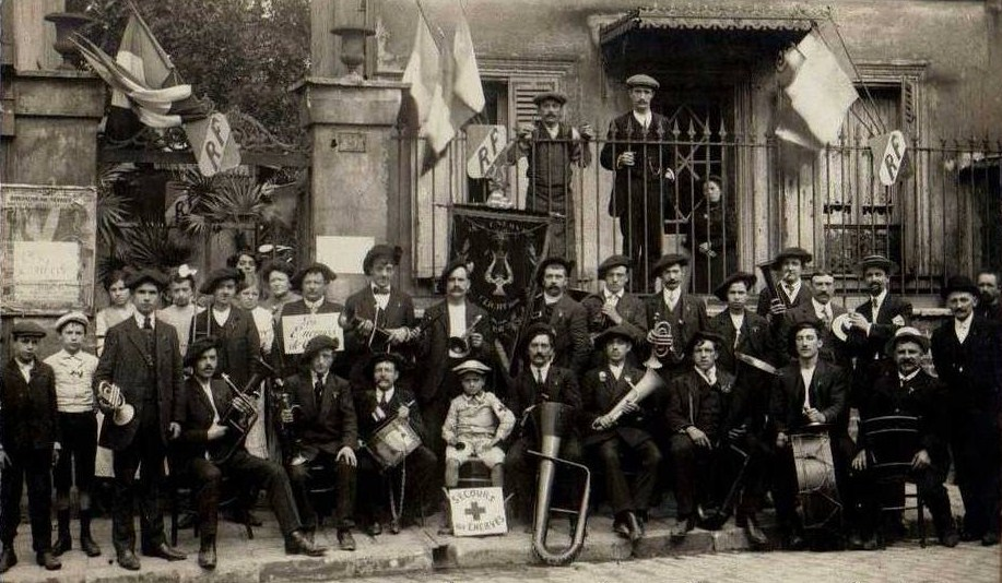 Photo prise aux Lilas, banlieue de Paris, à l'occasion d'un concours de bigophones organisé en mai 1912.